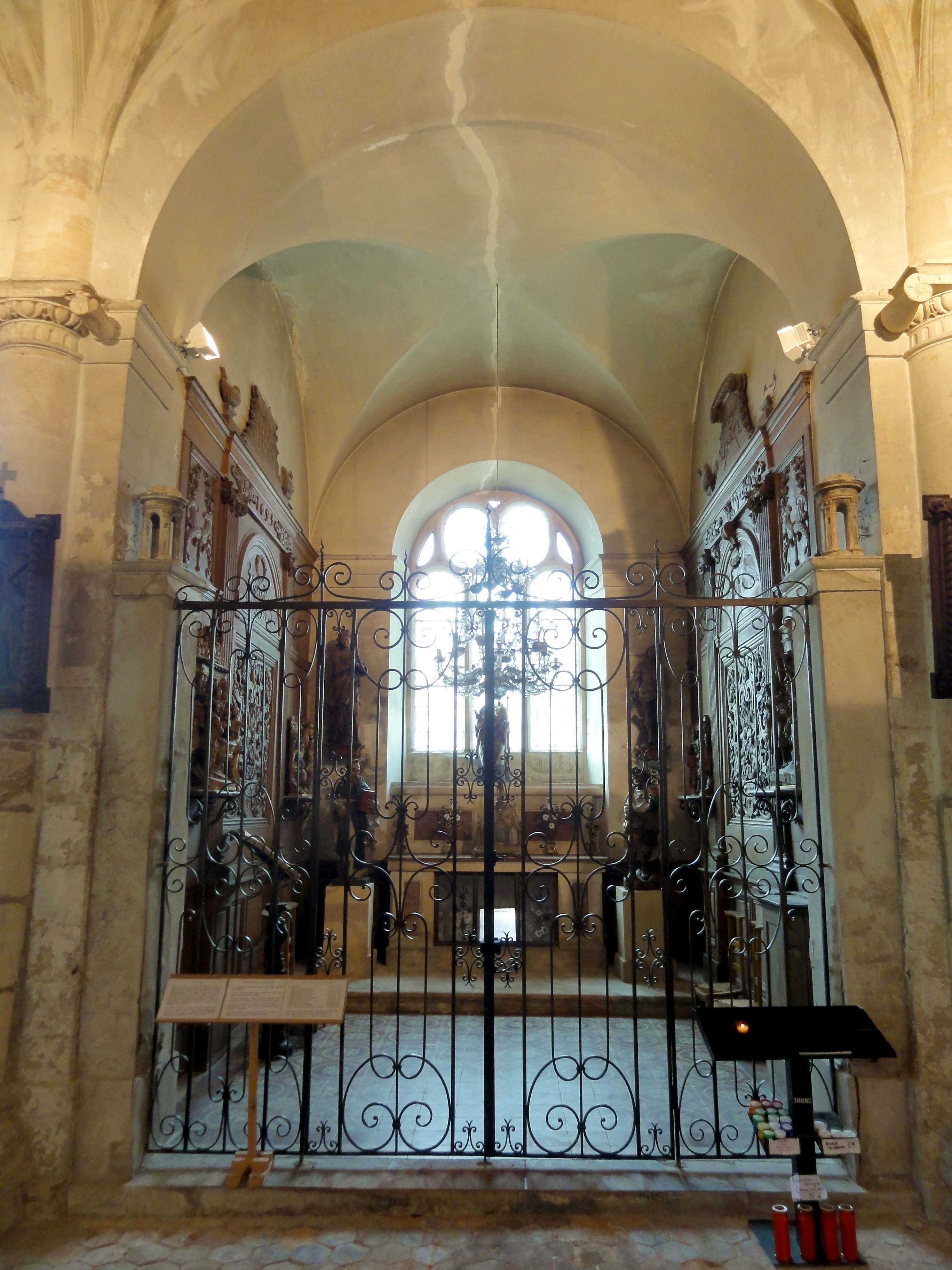 Bas-côté sud, chapelle de la 3e travée (Saint-Prix).